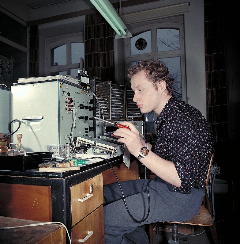 Original image description from the Deutsche Fotothek Elektronikfacharbeiter